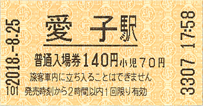 JR東日本 愛子駅 入場券